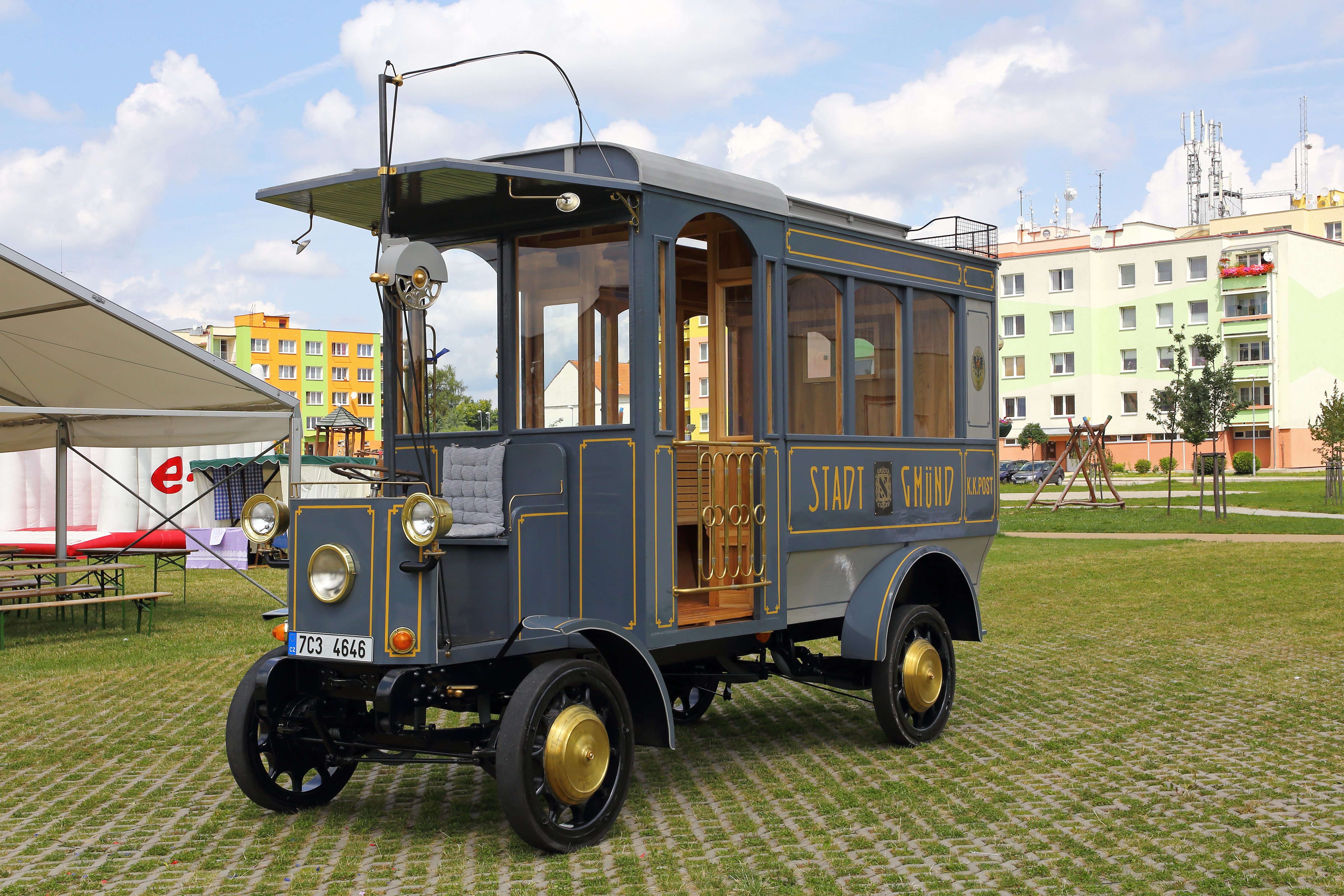 Am 21. Juli 2016 wurde in České Velenice ein von Herrn Jiri Kovac gefertigter Nachbau eines Busses der Elektrische Oberleitungs-Automobillinie Gmünd (1907-1916) der Öffentlichkeit präsentiert.